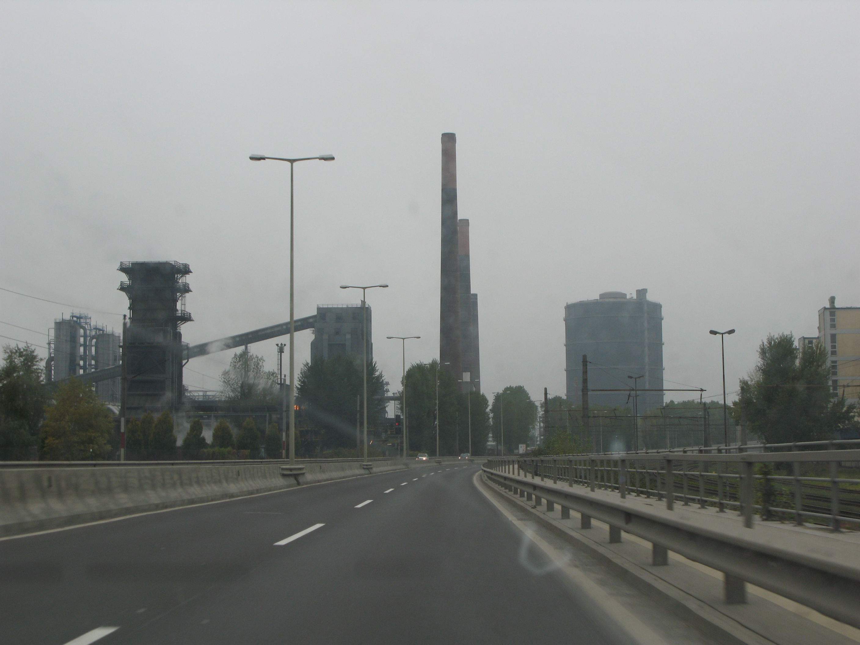 Stahlwerk in Linz